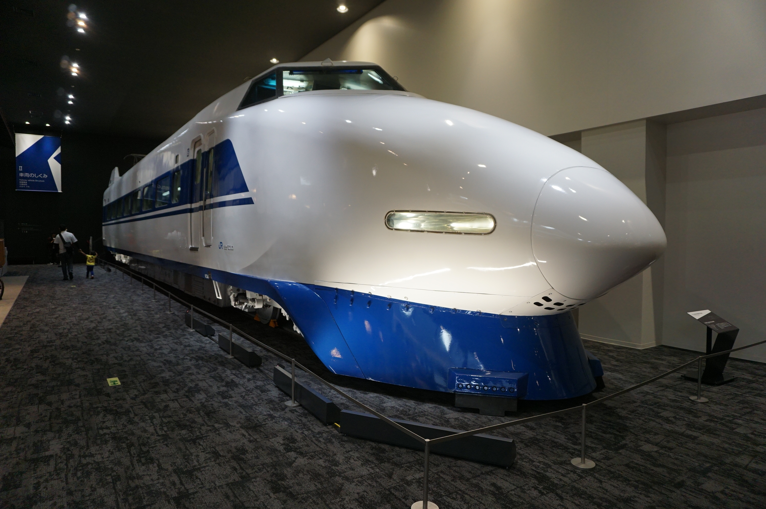 京都鉄道博物館に保存された122-5003号車